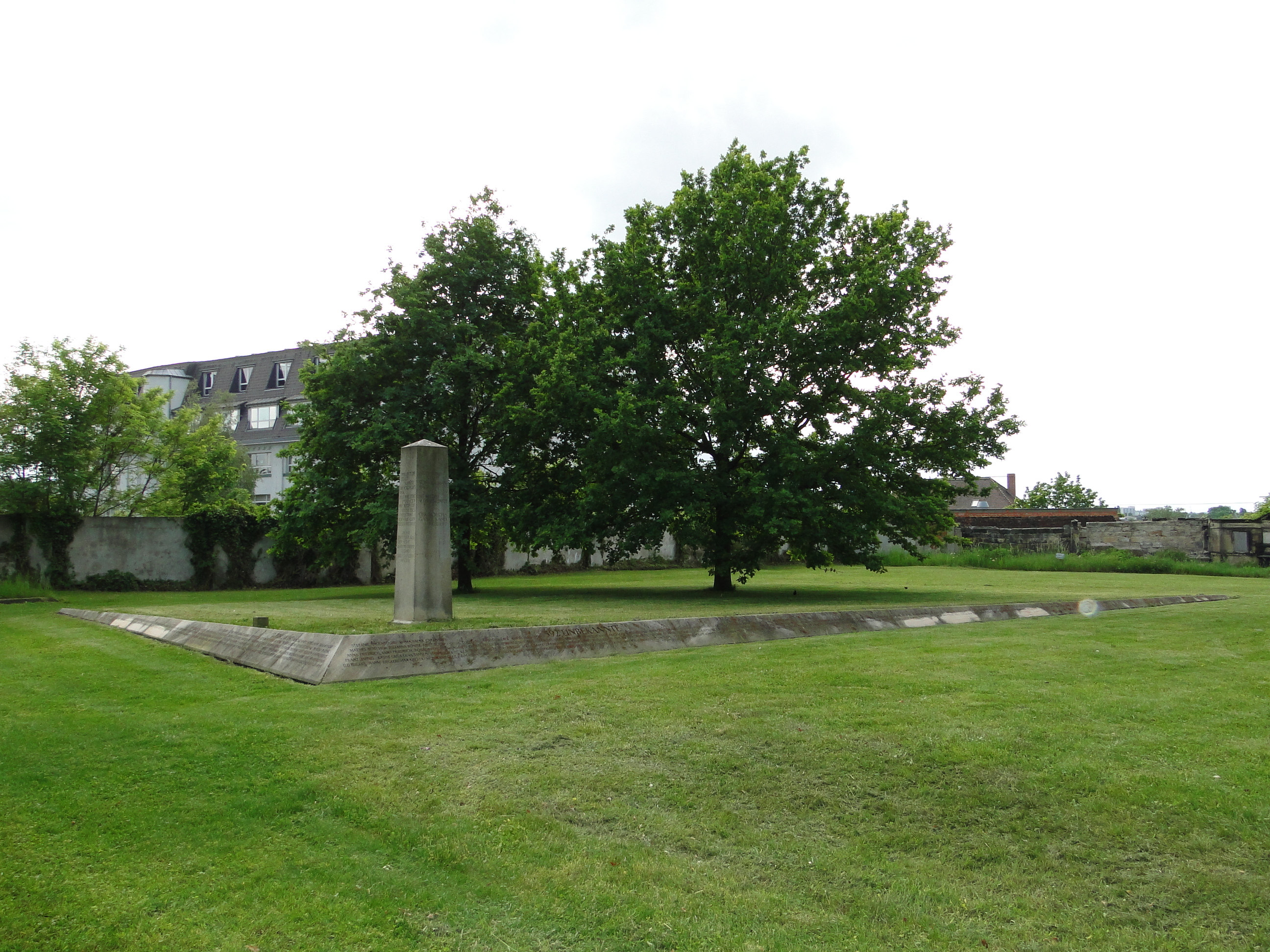 Gedenkstätte für die Opfer des 13. Februar auf dem Alten Annenfriedhof in Dresden